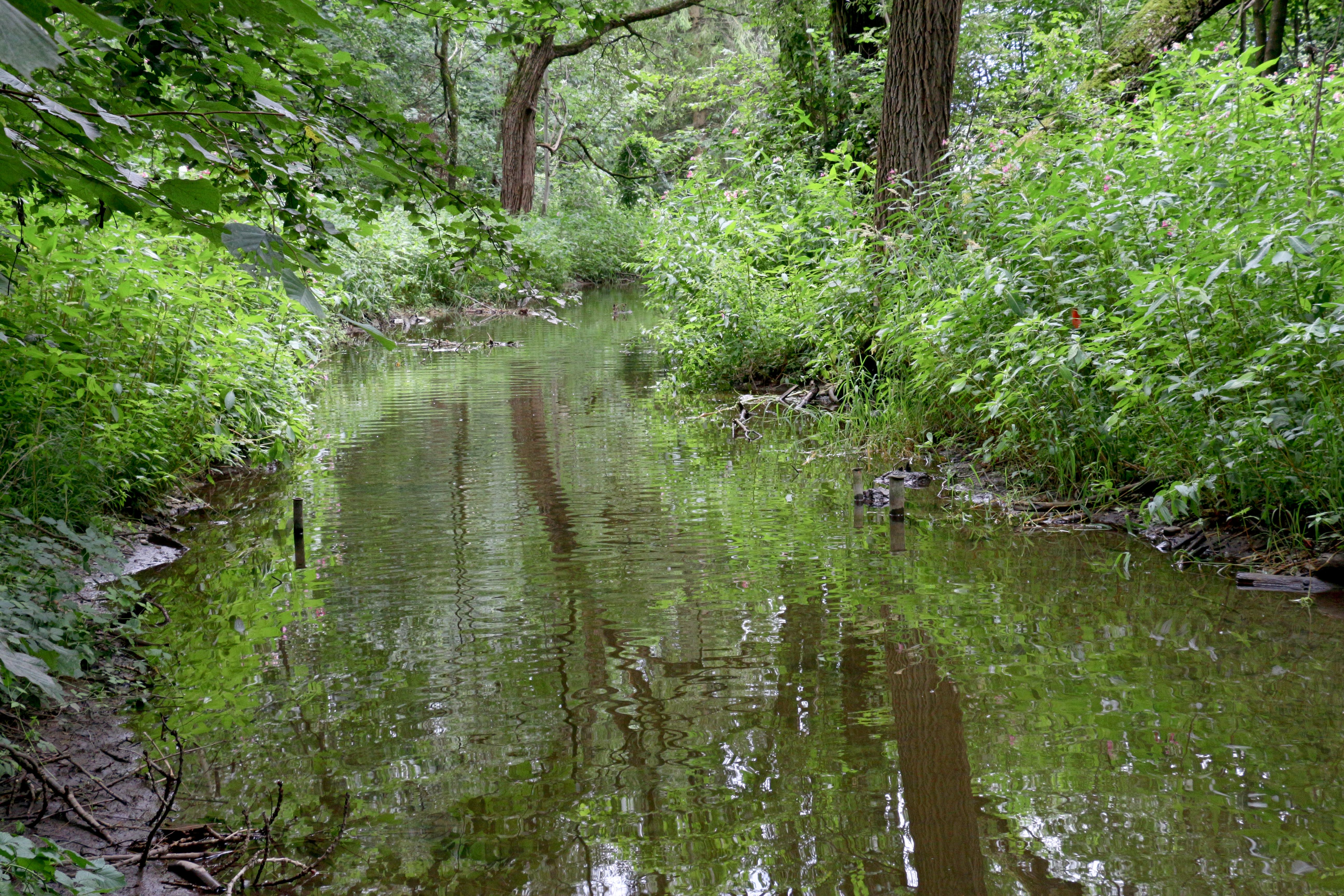 Die Altglan, der unterste Lauf der Glan bzw. des Glanbachs im Norden der Stadt Salzburg im Bereich des Landschaftsschutzgebiets Salzachsee-Saalachspitz.